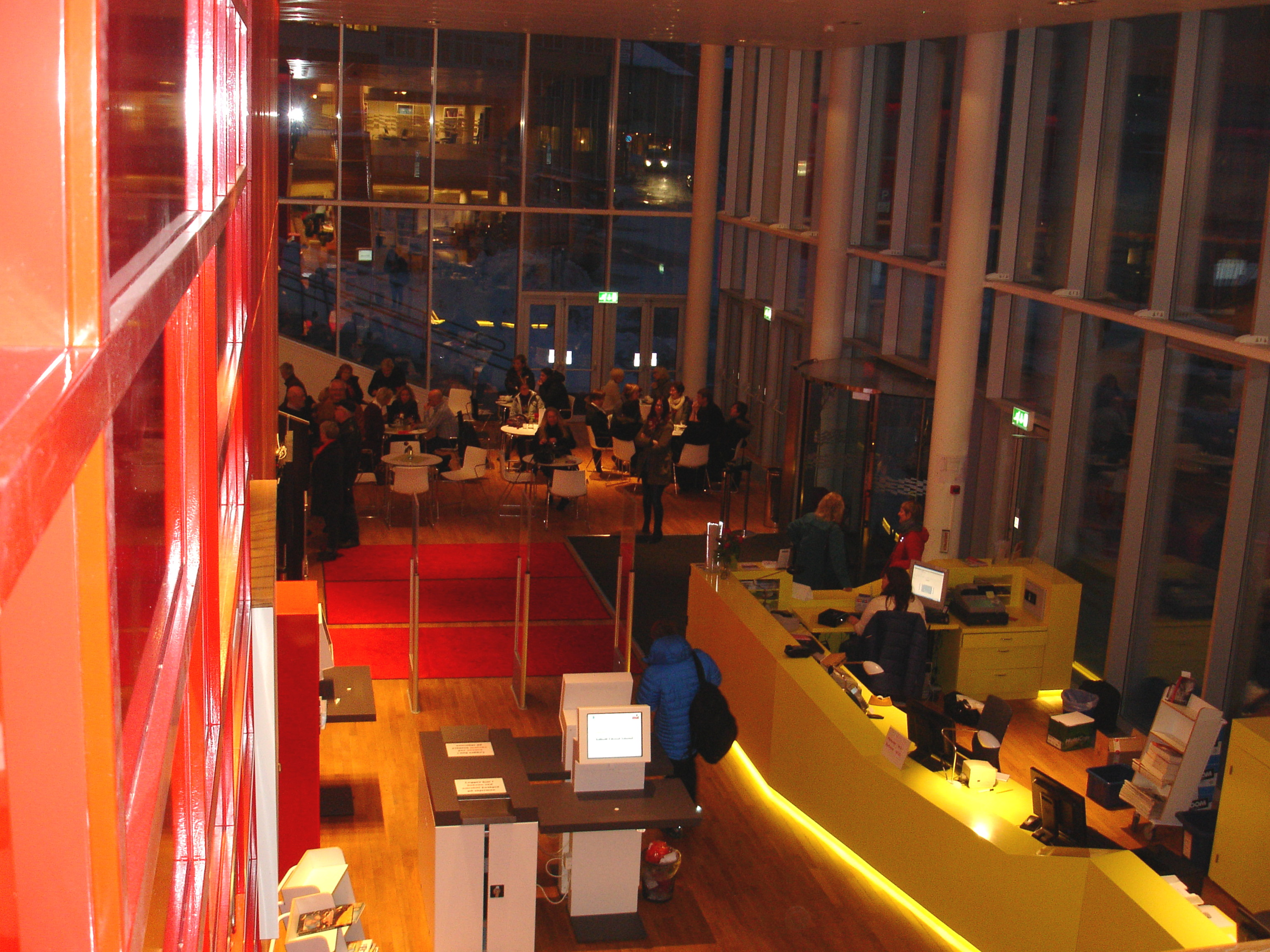 Molde bibliotek, 1.etasje - hovedskranken